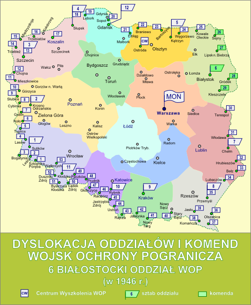 Dyslokacja oddziałów i komend Wojsk Ochrony Pogranicza w październiku 1946 r. - 6 Białostocki Oddział WOP